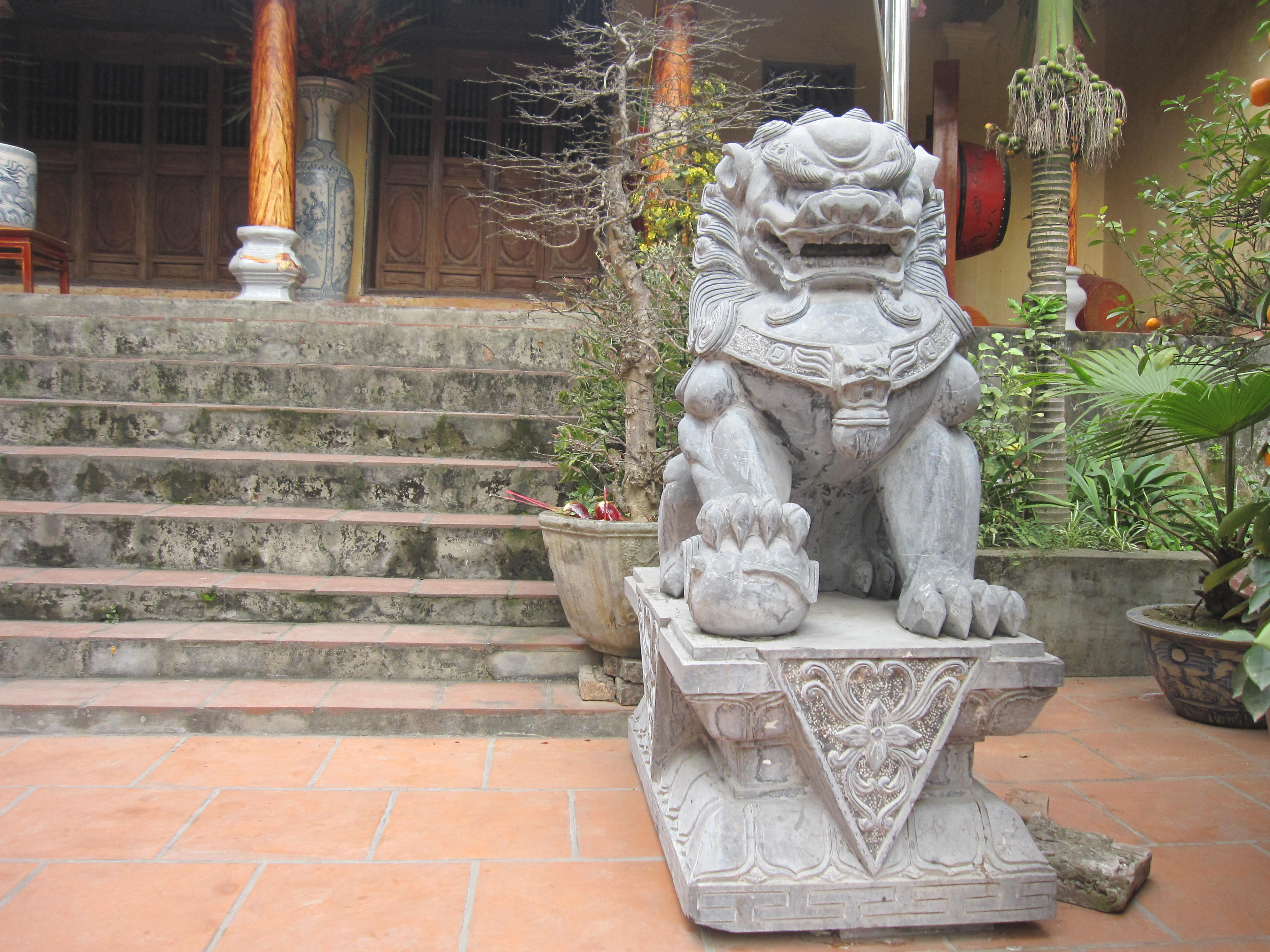 Sư tử đá trong sân chùa Khai Nguyên, phường Xuân La, quận Tây Hồ, Hà Nội, Việt Nam